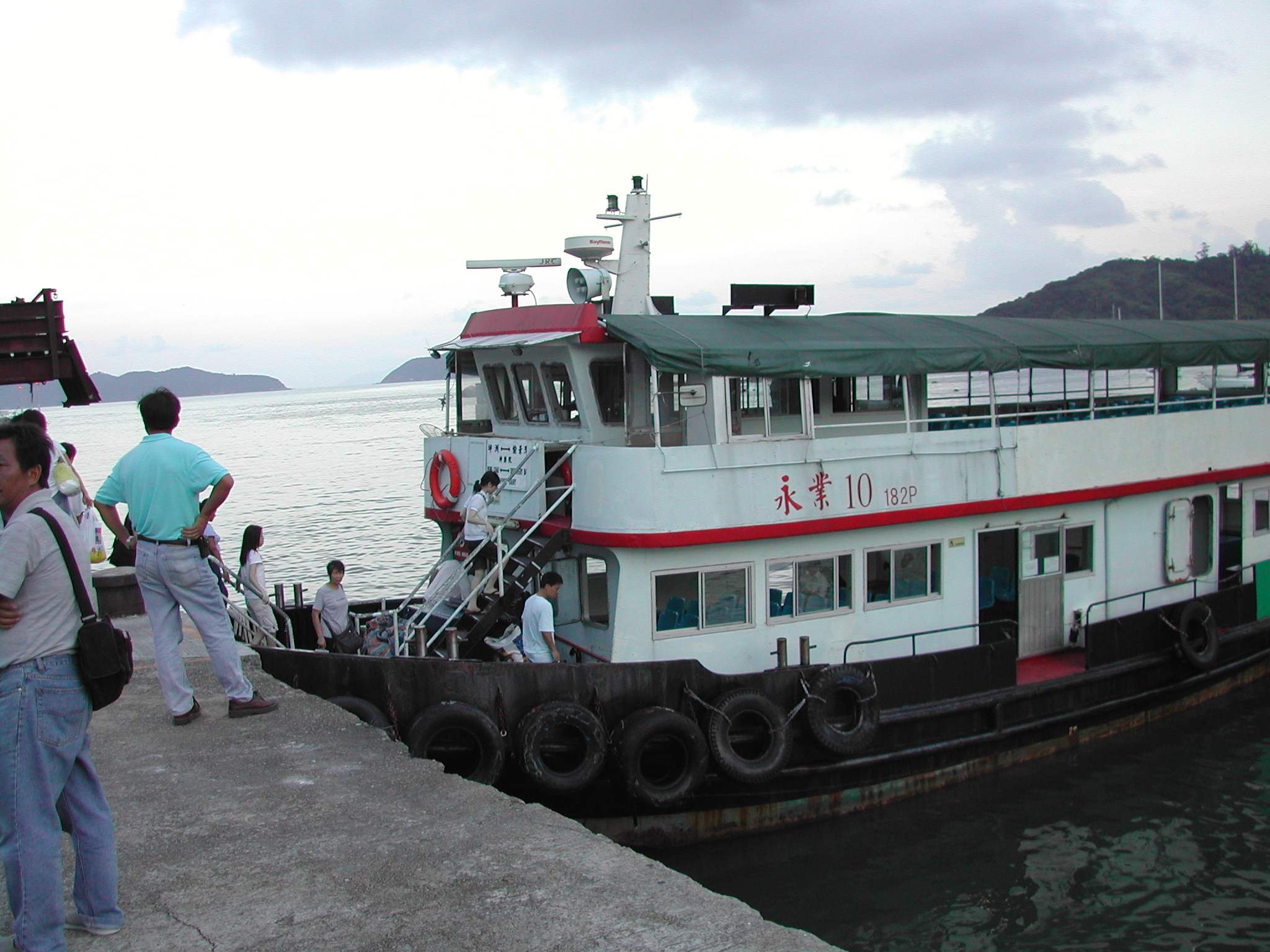 Self-taken.